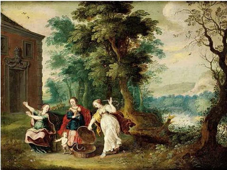 Die Töchter des Kekrops befreien Erechtheos/Erechteus/Erichthoniustitle QS:P1476,de:"Die Töchter des Kekrops befreien Erechtheos/Erechteus/Erichthonius" label QS:Lde,"Die Töchter des Kekrops befreien Erechtheos/Erechteus/Erichthonius"